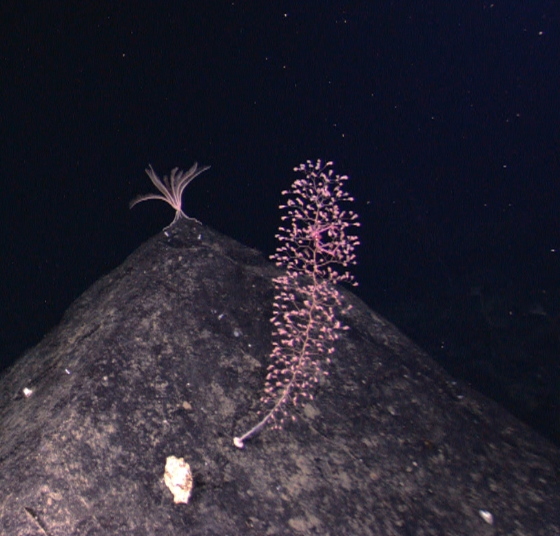 Chrysogorgia sp (derecha) y crinoideo (izquierda)